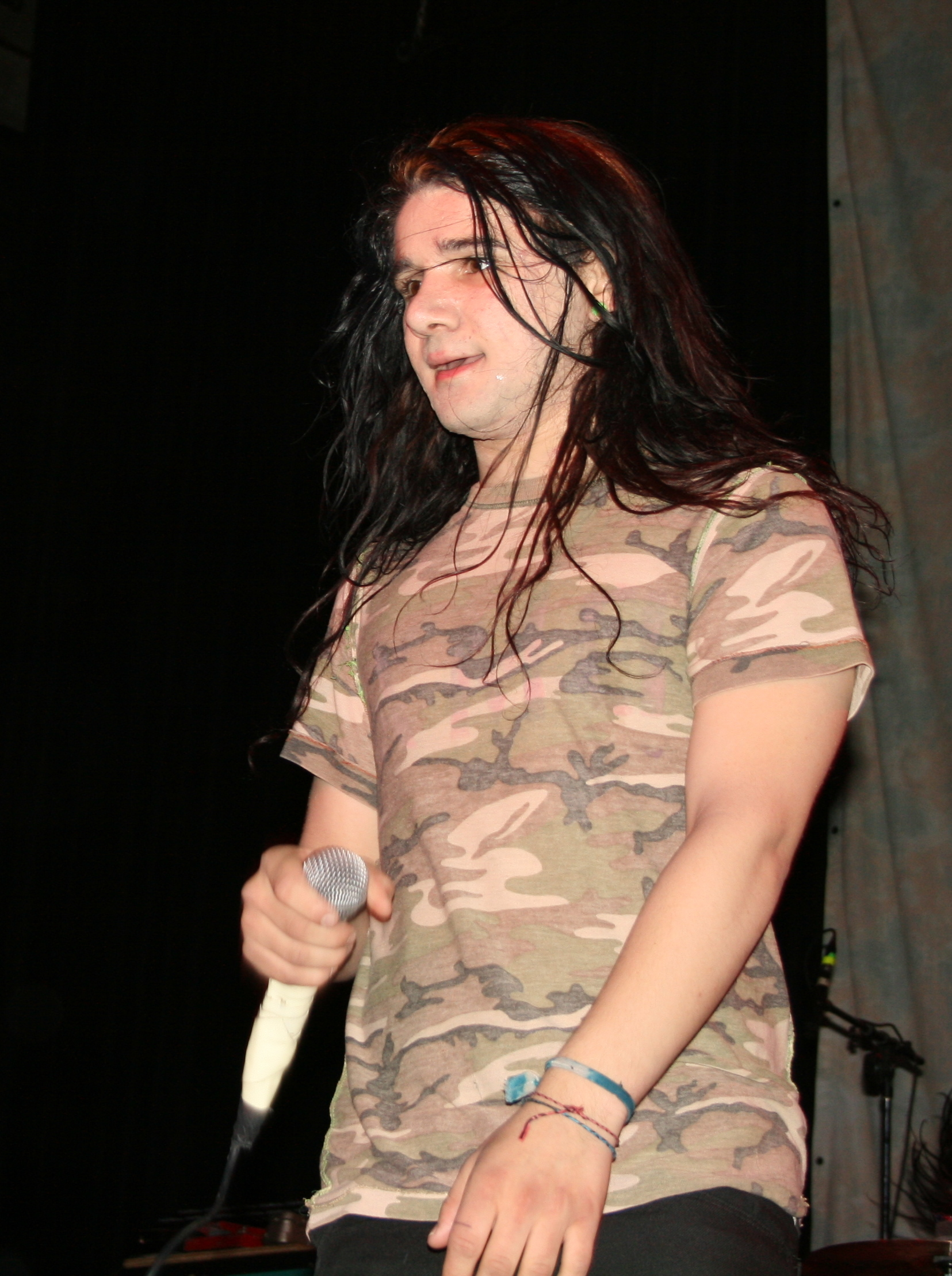 Skrillex in 2008